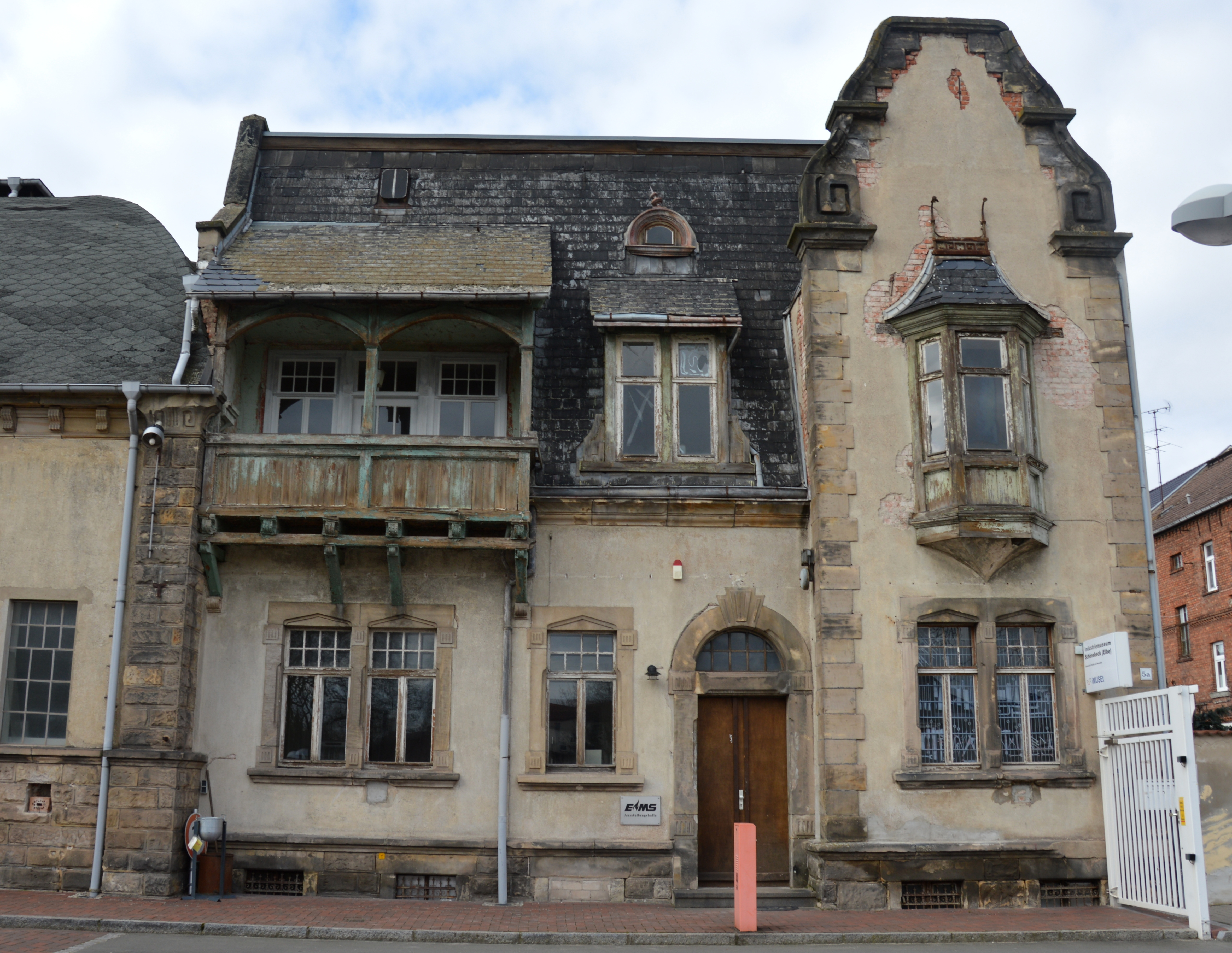 Umspannwerk Schönebeck